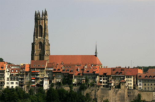 Fribourg / Freiburg: Cathédrale Saint Nicolas (Bau: 1182/1283)